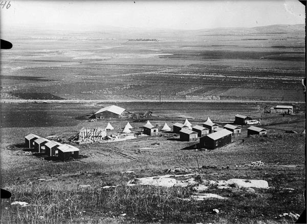 יקנעם - מראה כללי.